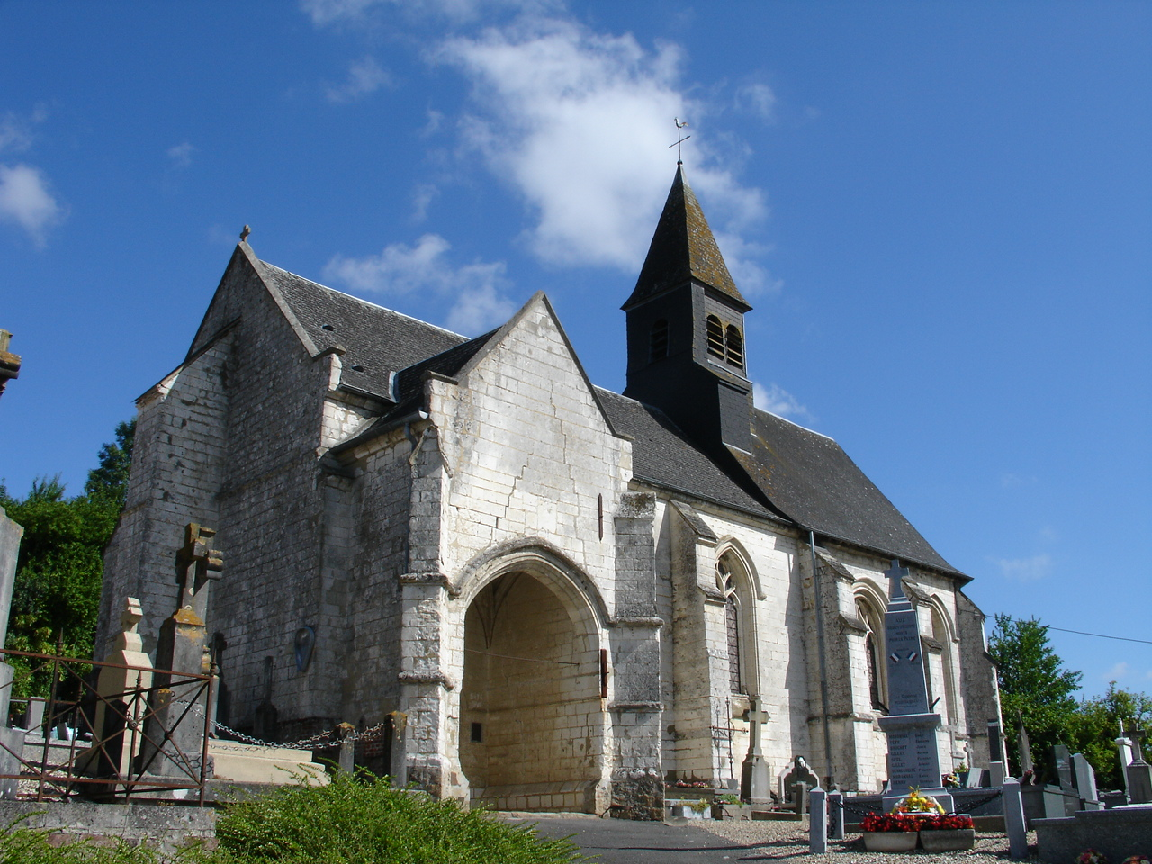 Église d'Hesmond